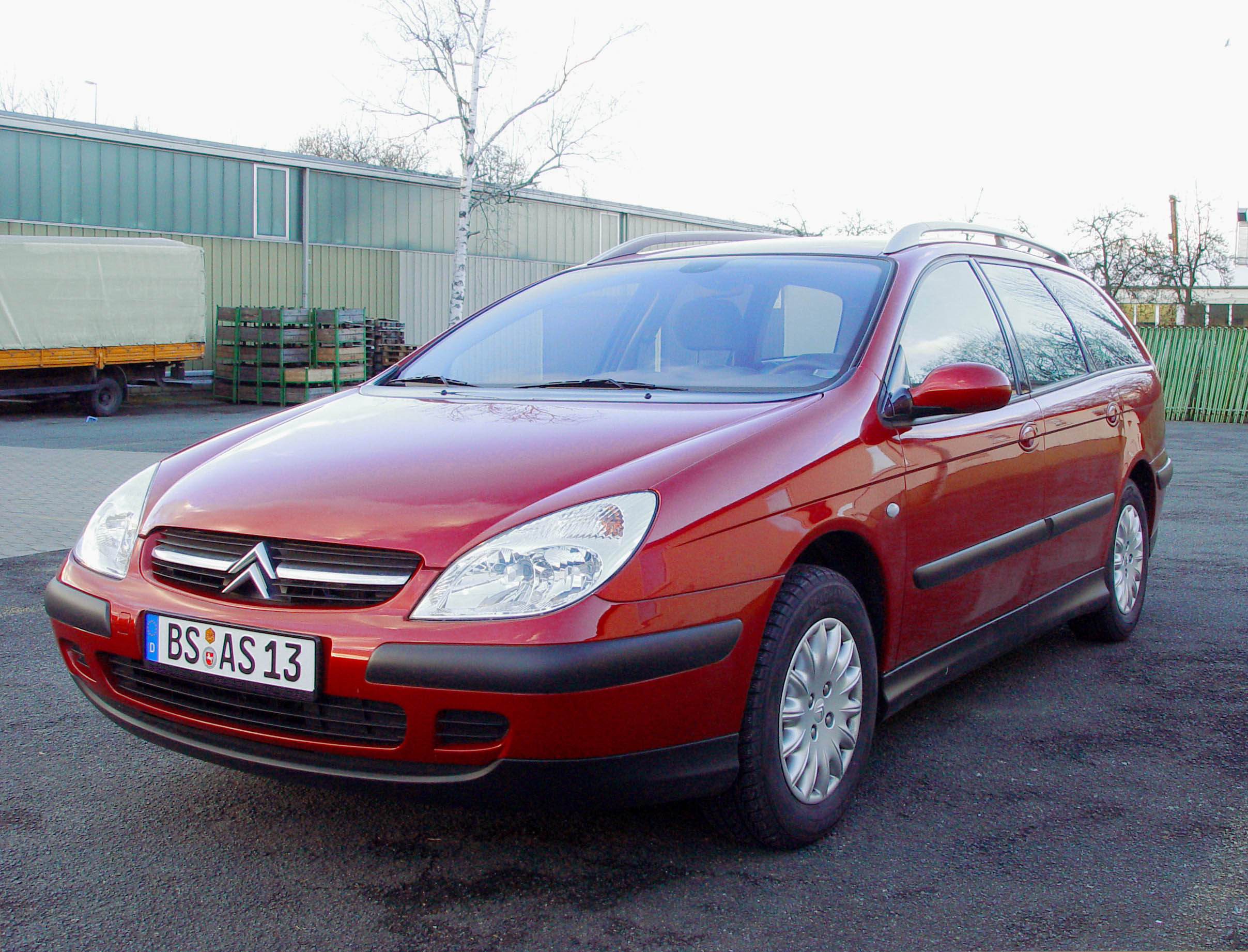 Beschreibung: Citroën C5 SX, Baujahr 2003 Aufnahmedatum: 14. Februar 2005 Fotograf: ArtMechanic